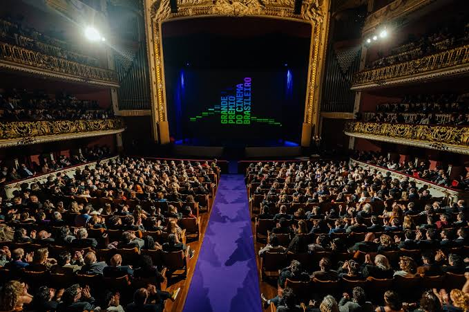 Mostrar noite de gala do cinema.